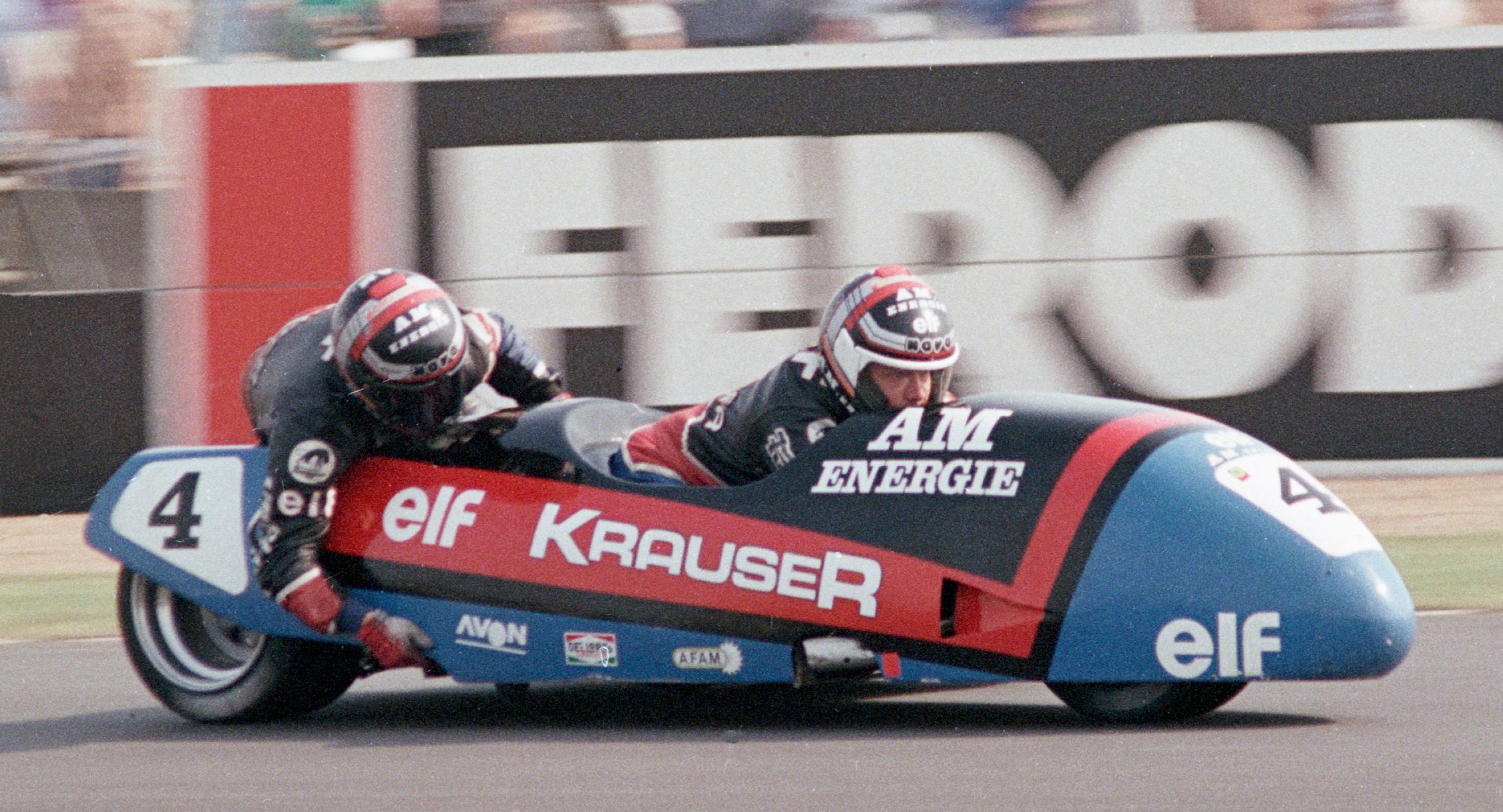 Alain Michel et Jean-Marc Fresc sur LCR Krauser - Grand Prix de Grande-Bretagne 1989 à Donington